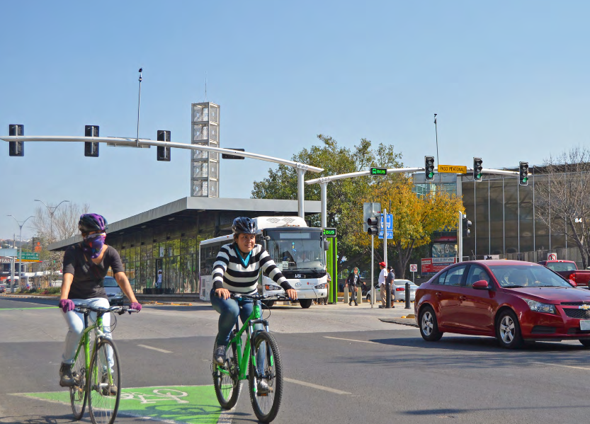 Ciclistas en Av. Constituyentes en Santiago de Querétaro.